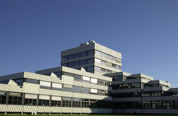 Hauptgebäude Campus Lemgo (2010).